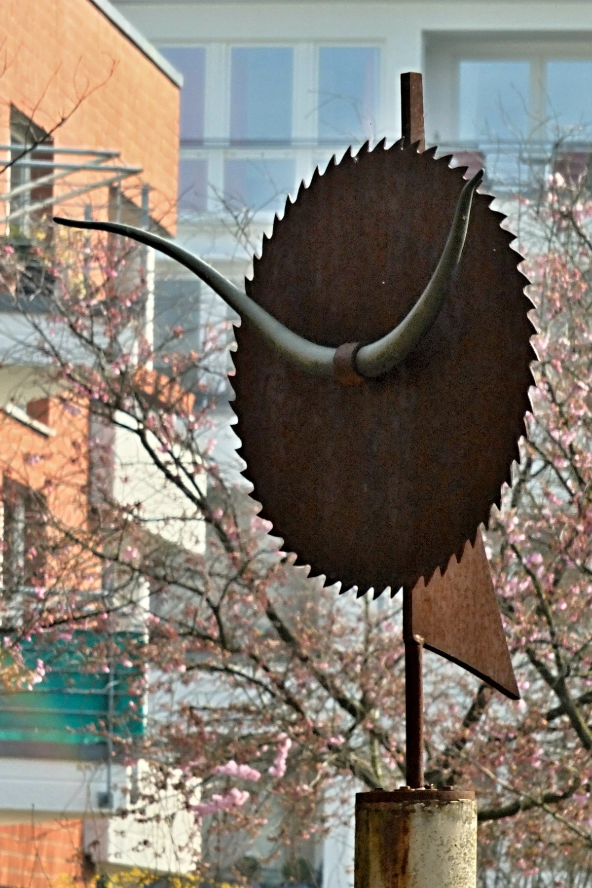 Stele "Zeichen zur neuen Mitte" von Willy Bitter im Stadtsee Kaarst